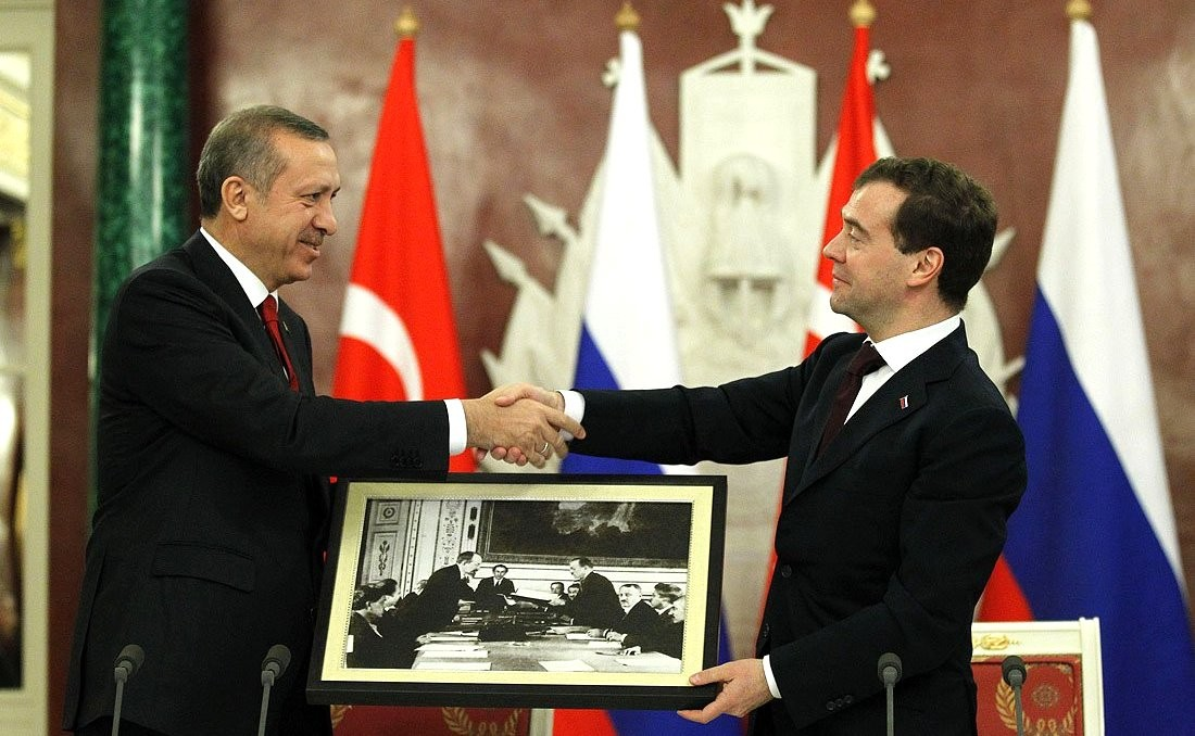 Дмитрий Медведев передал Реджепу Тайипу Эрдогану фотографию, на которой народный комиссар по иностранным делам РСФСР и СССР Георгий Чичерин и представитель Правительства Великого народного собрания Турции Юсуф Кемаль-бей обмениваются текстами Договора о дружбе и братстве между Россией и Турцией. Фото сделано 16 марта 1921 года в Москве